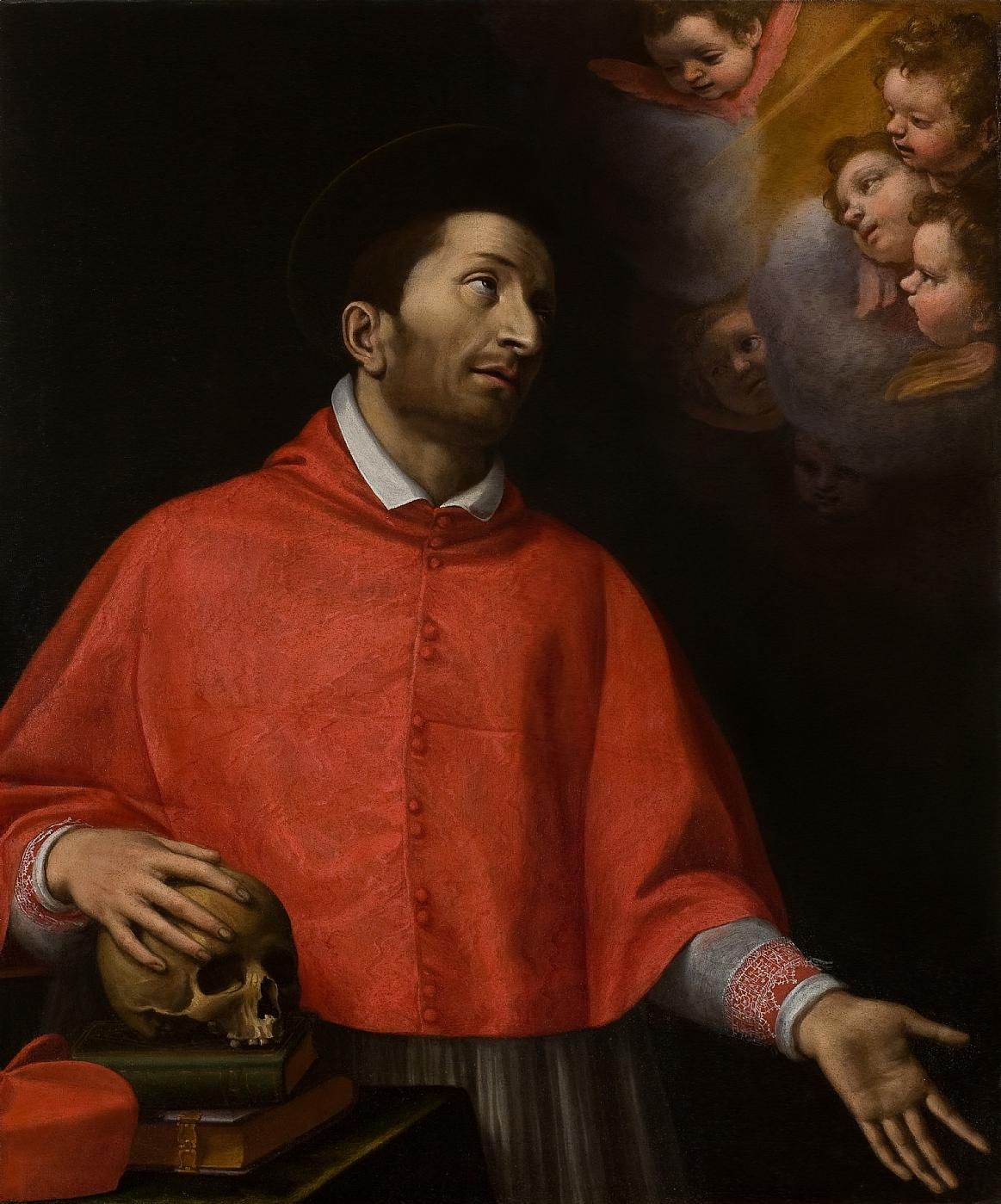 Ciampelli Agostino: San Carlo Borromeo, XVII d.C Materiali olio su tela Misure 107.3 x 87.4 cm Collocazione priv.